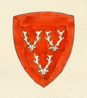 Stemma della famiglia Soderini